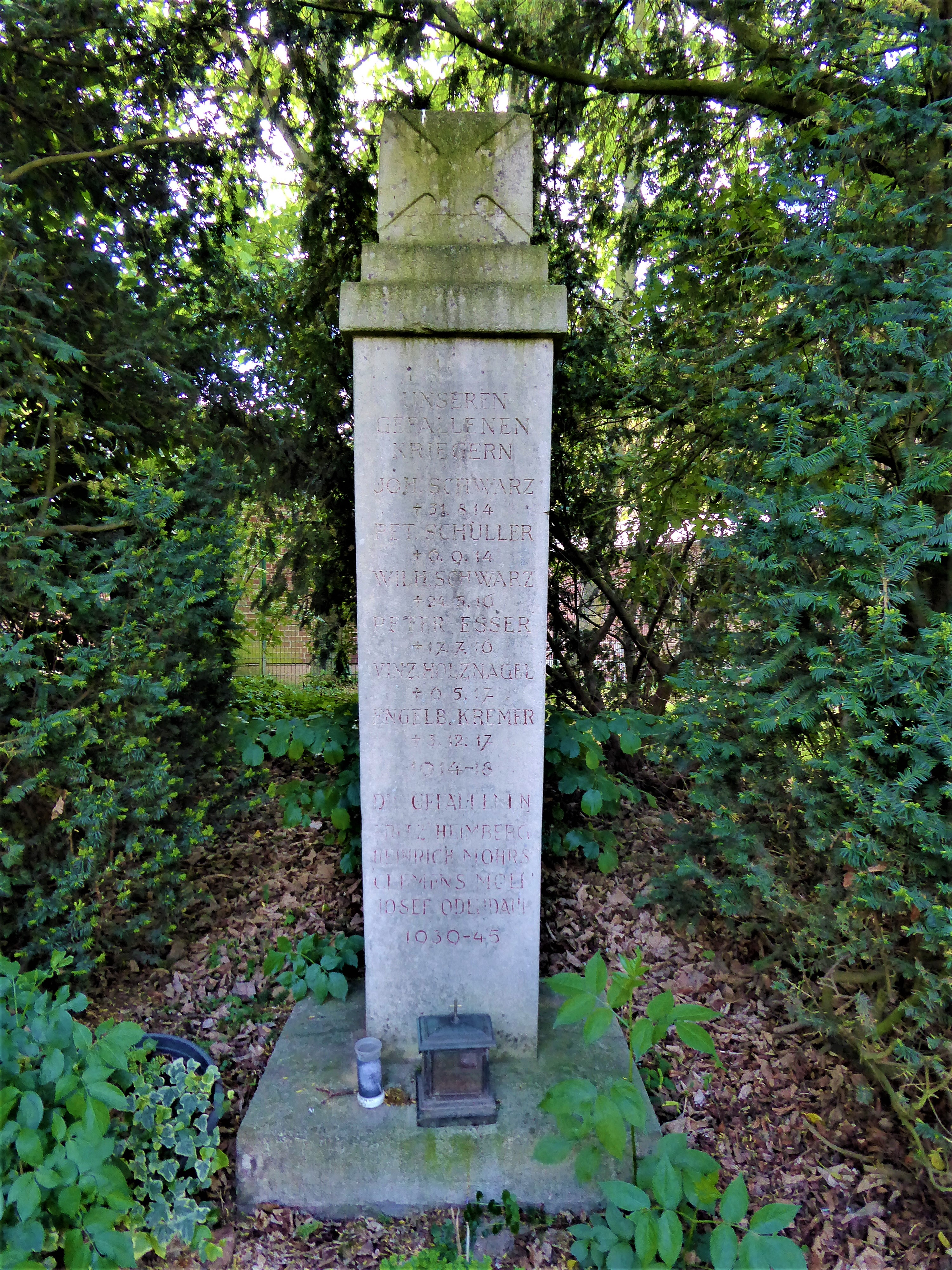 Kriegerdenkmal Feldkassel, transloziert nach Köln-Fühlingen